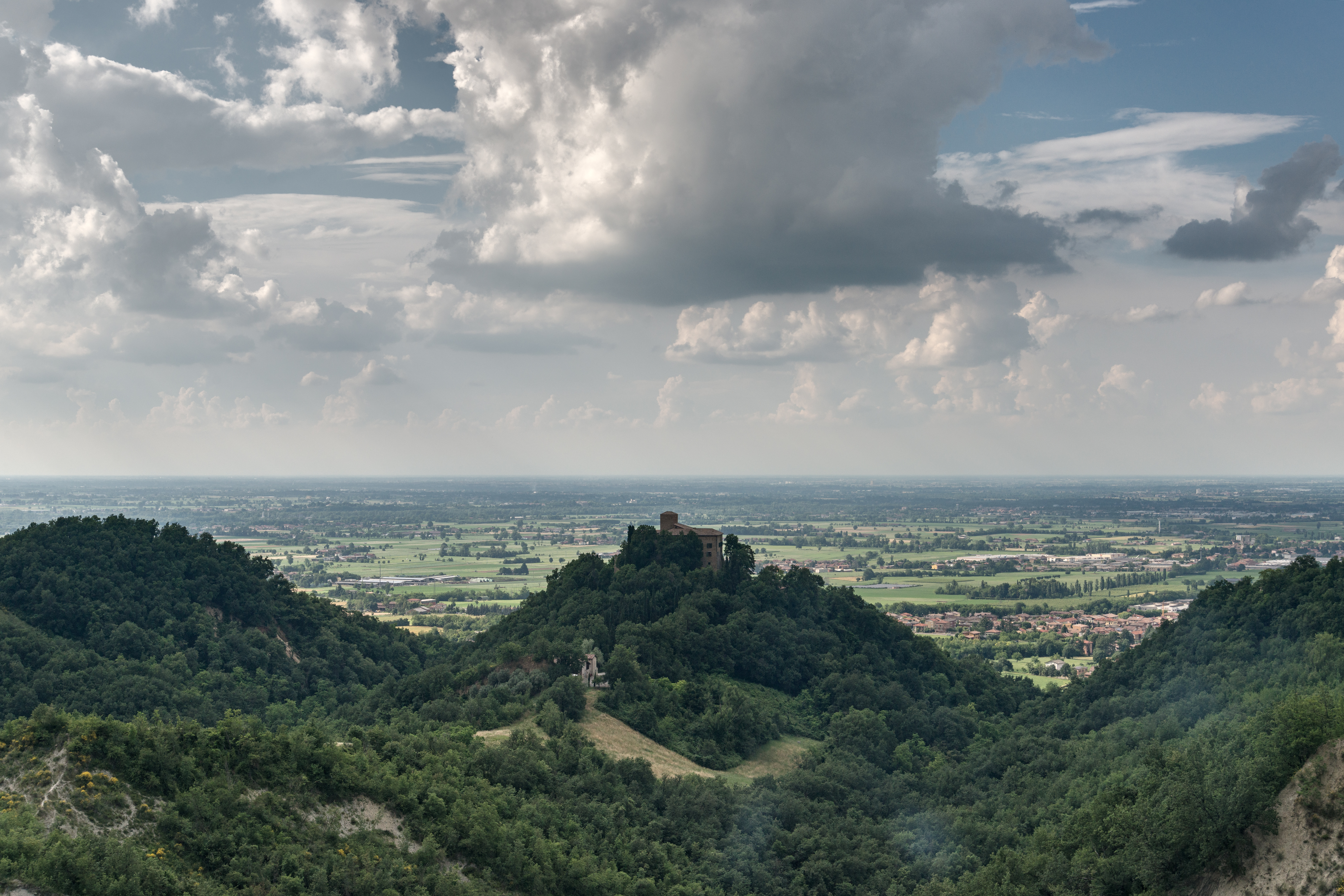 Castello di Bianello - Quattro Castella, Reggio Emilia, Italia